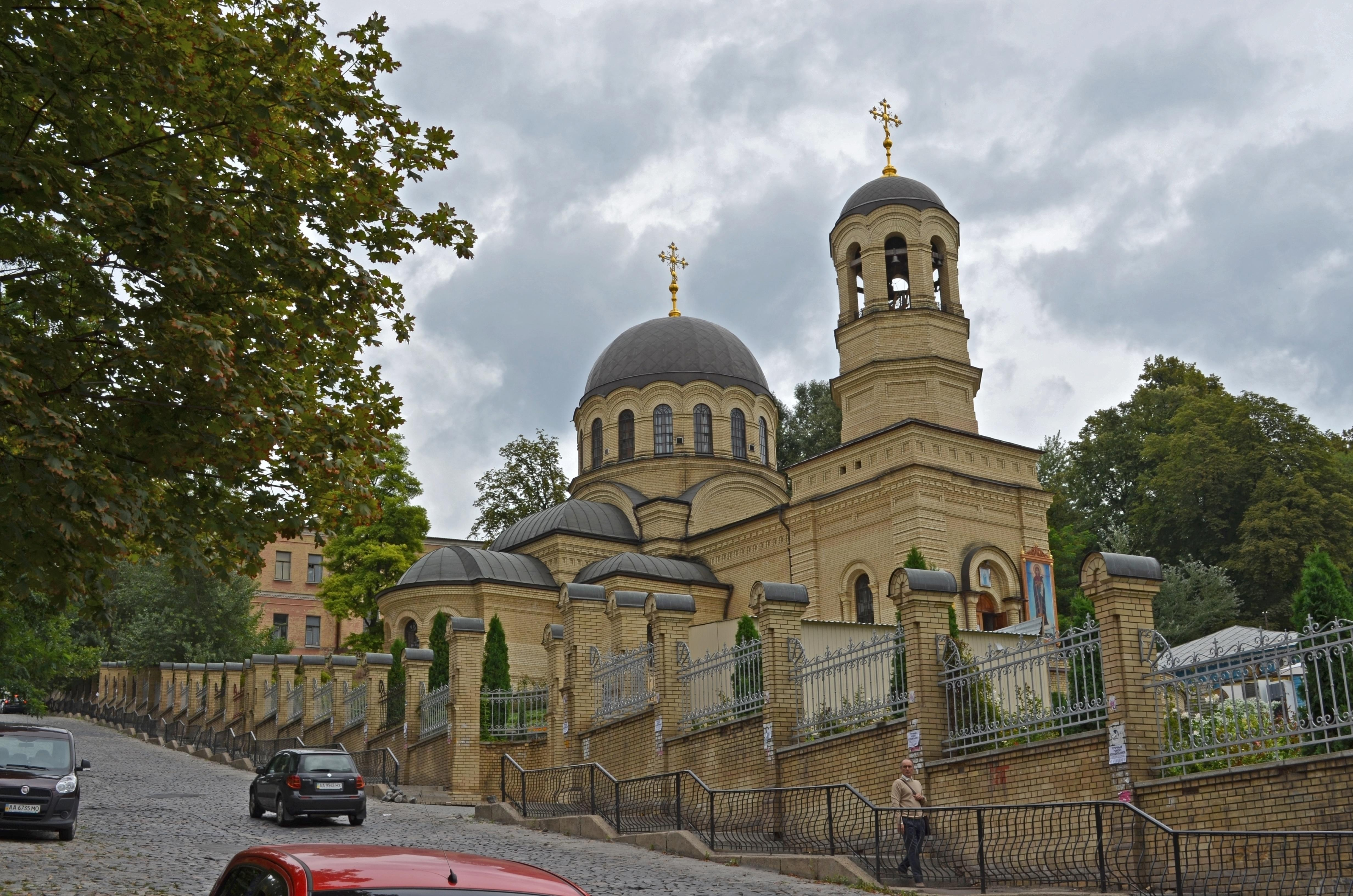 Церква св. Михаїла (фундаменти), Київ, Шовковична вул., 39/1